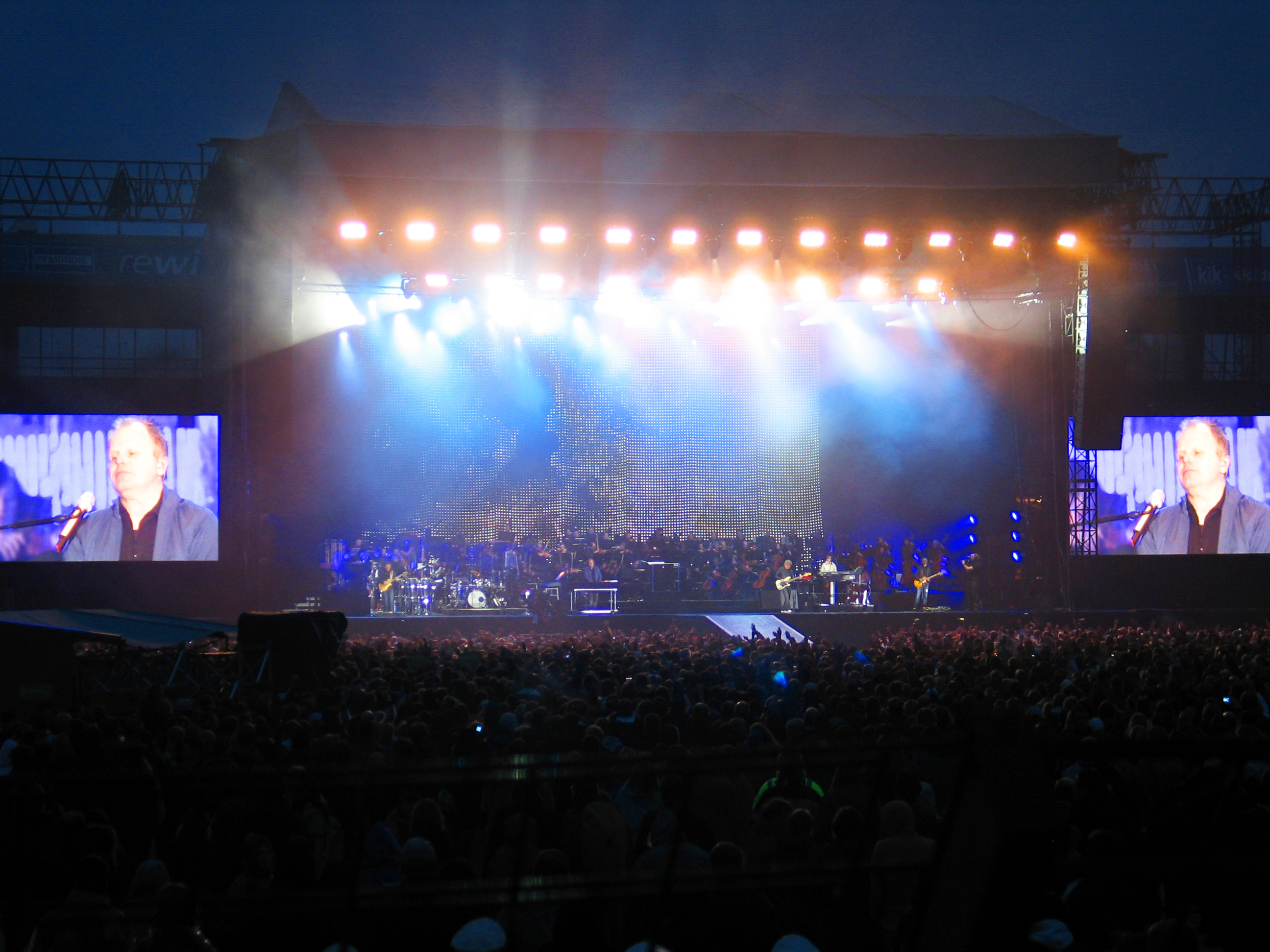 Konzert Herbert Grönemeyers im Juni 2009 in seiner Heimatstadt Bochum